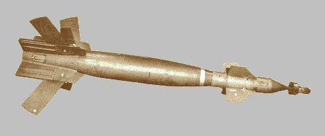 Amerykańska bomba kierowana GBU-16/B